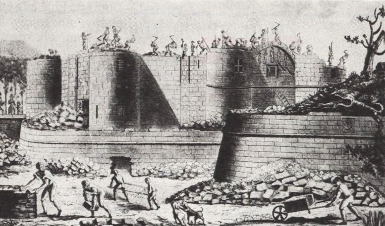 Les hommes de Palloy démontent la Bastille (juilllet 1789)